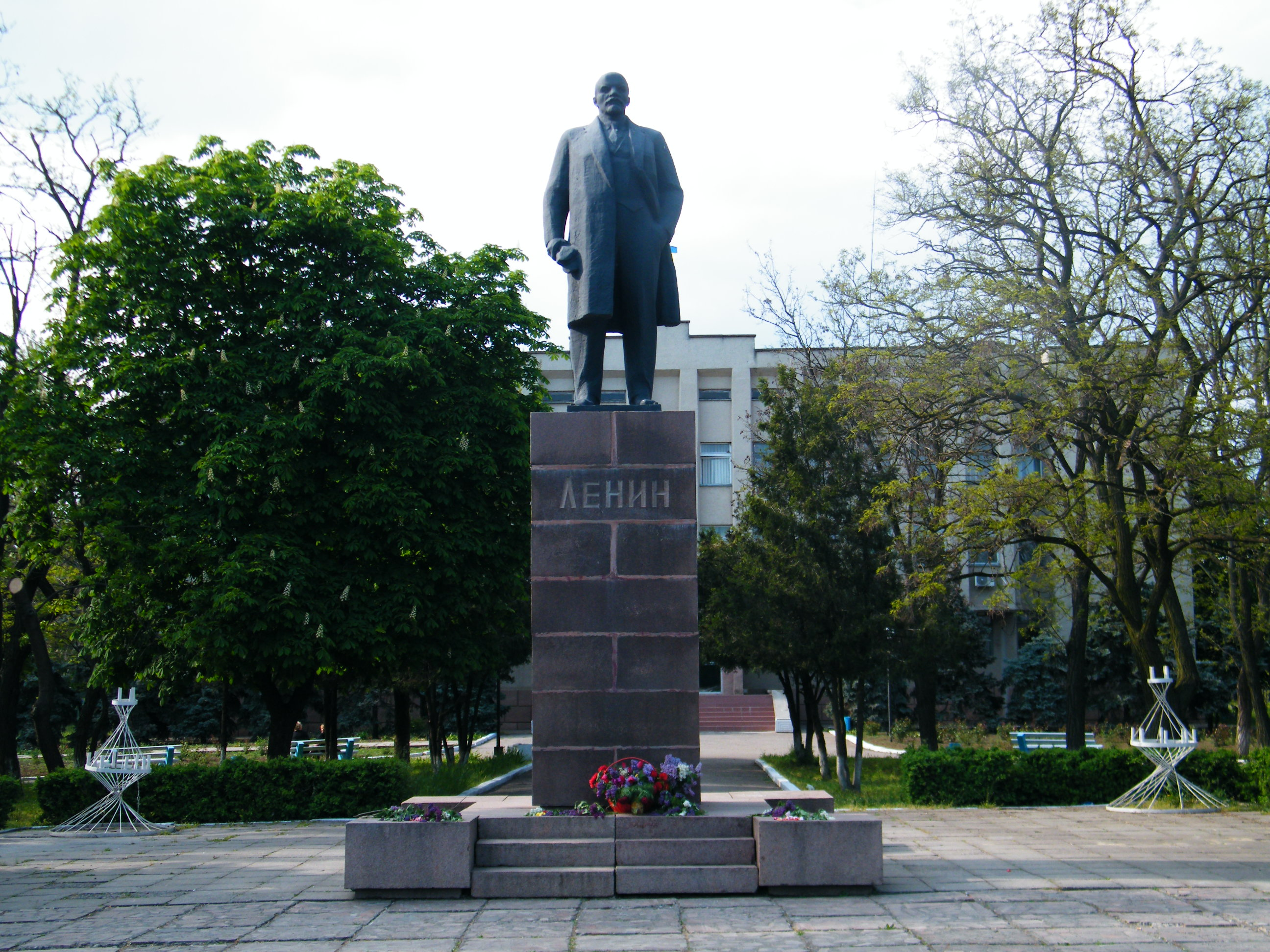 Пам'ятник Леніну в Очакові, травень 2014